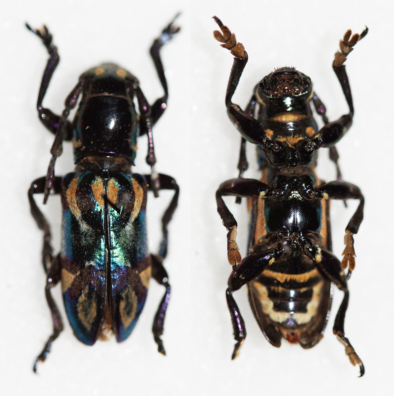 Schultze,1917 Sex: Male Data: 08-2013 - Belance Nueva Vizcaya - North Luzon - Philippines Size: 16mm